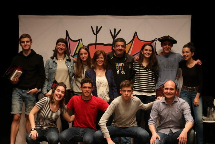 2018ko finala. (Iturria: Bizkaie!)